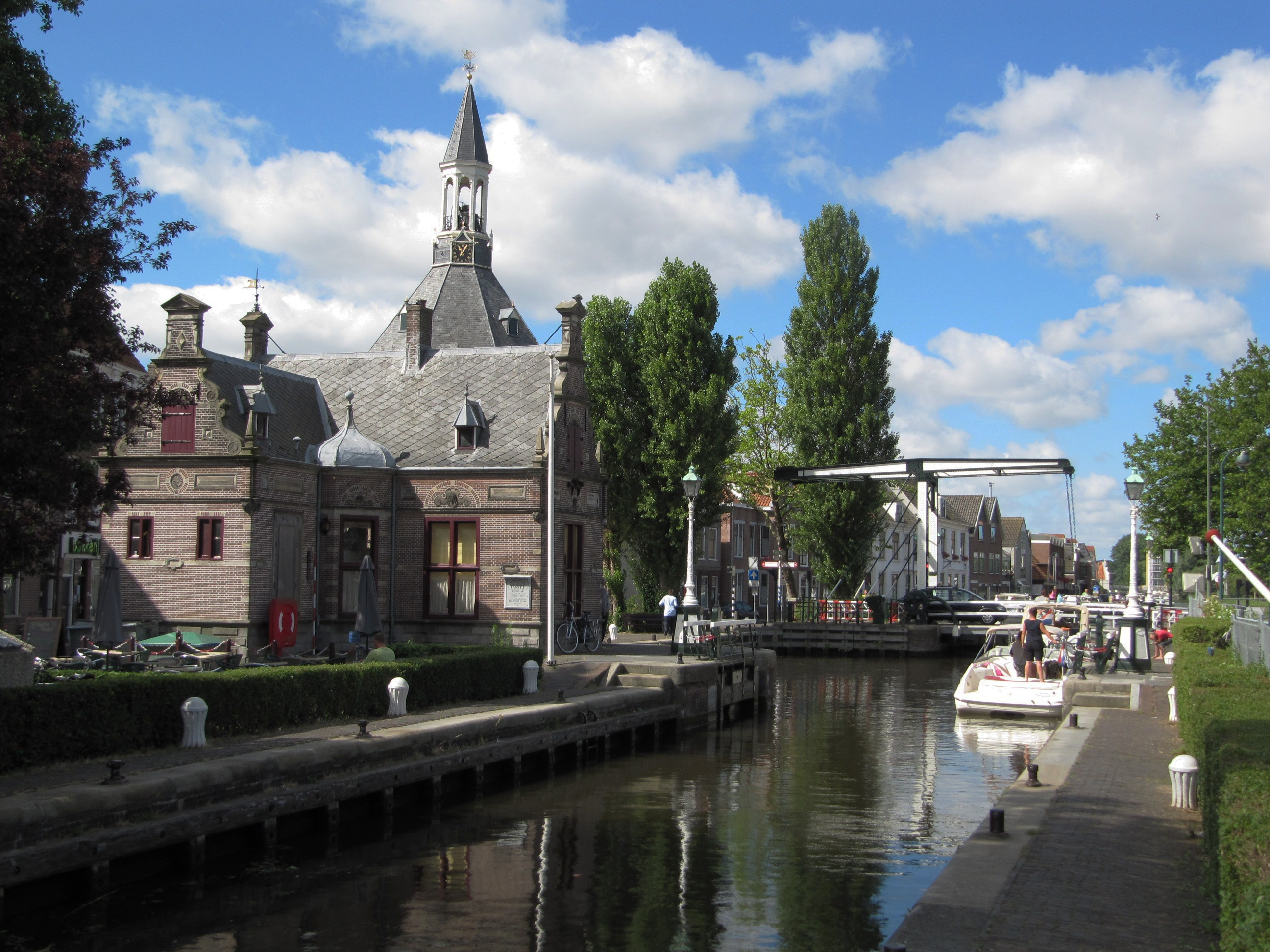 Leidschendam - Sluisplein 10.jpg, rijksmonument